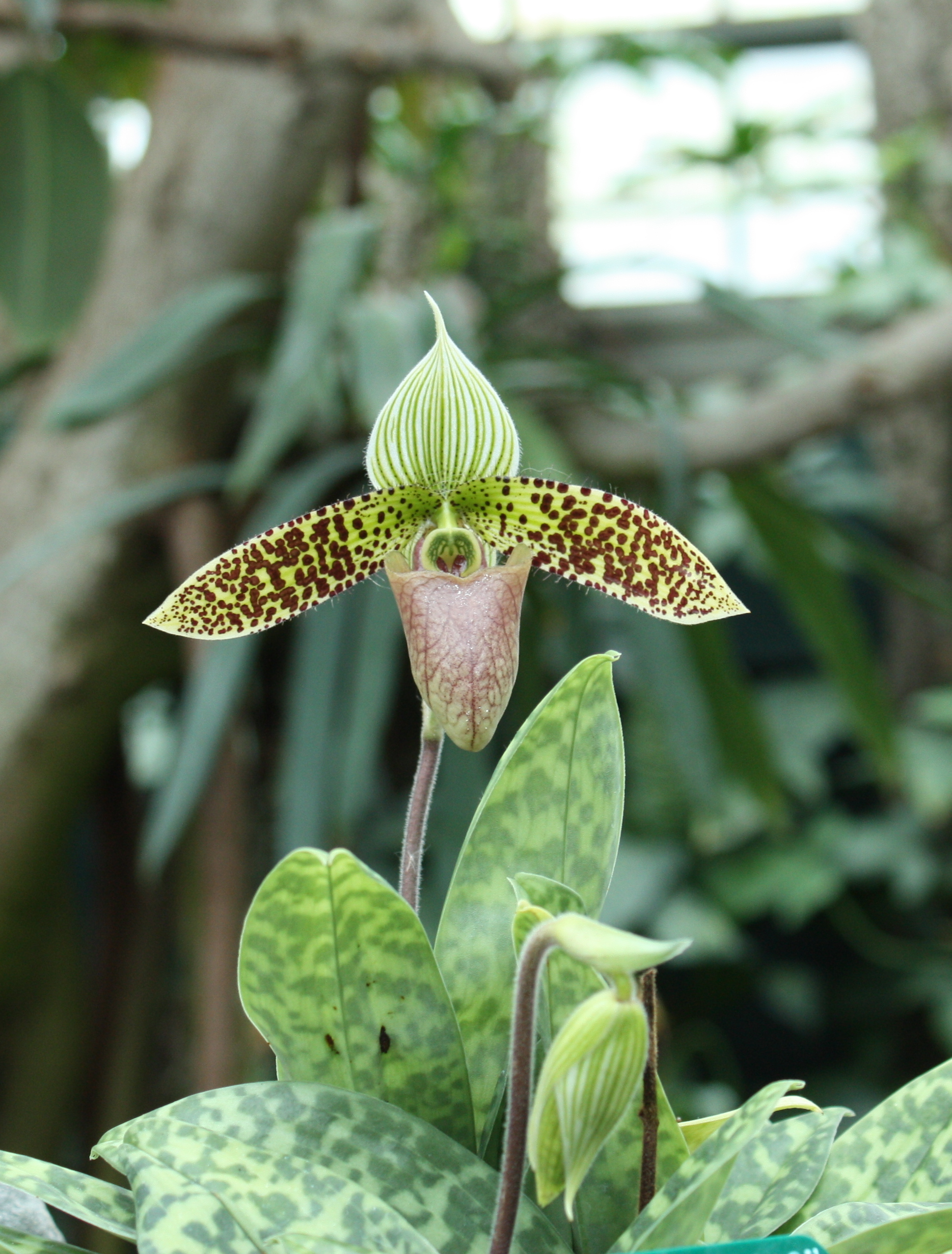 Paphiopedilum sukhakulii, au Jardin botanique de Montréal.